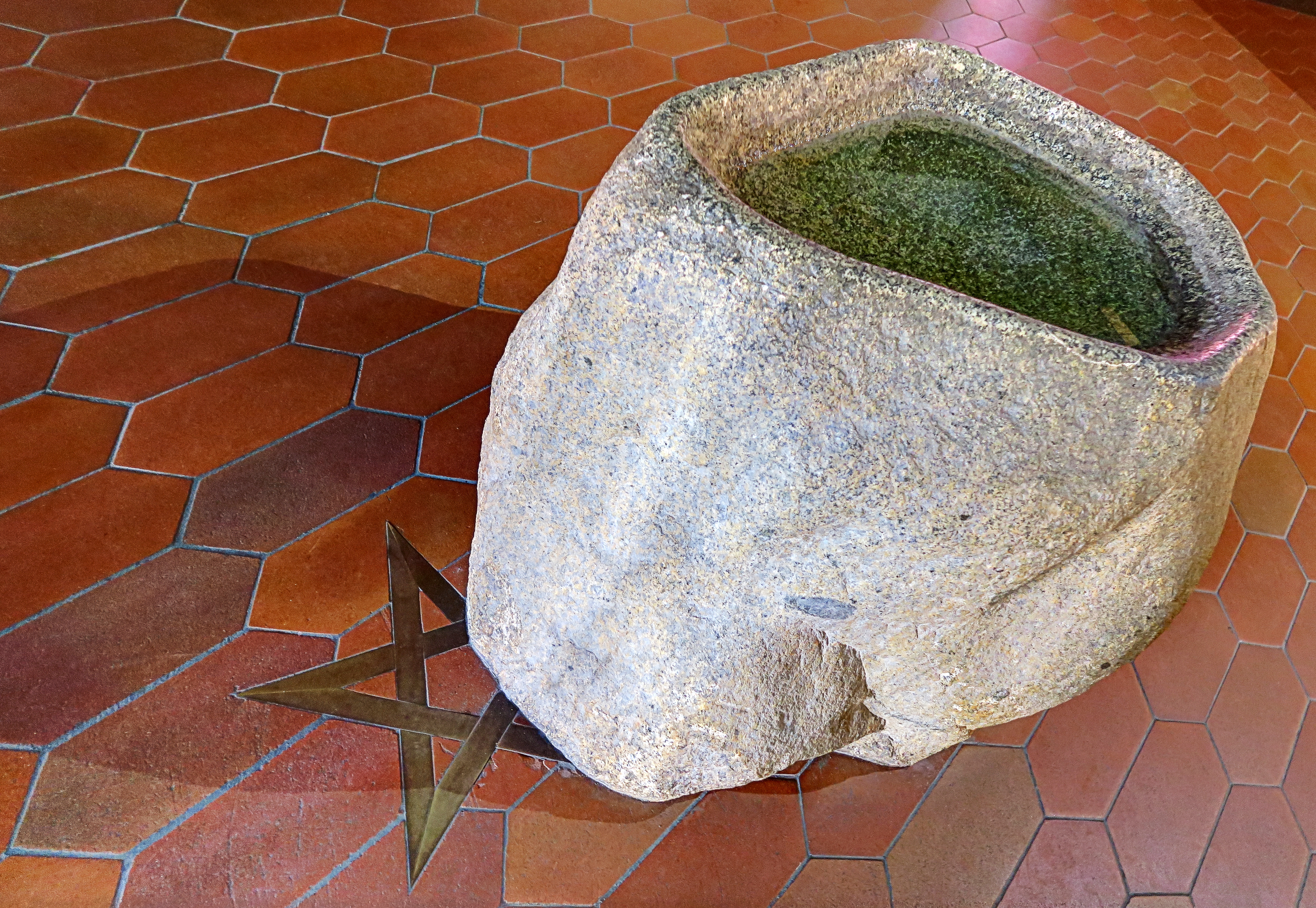 Italien, Südtirol, Algund, Kirche zum Heiligen Joseph, Weihwasserbecken